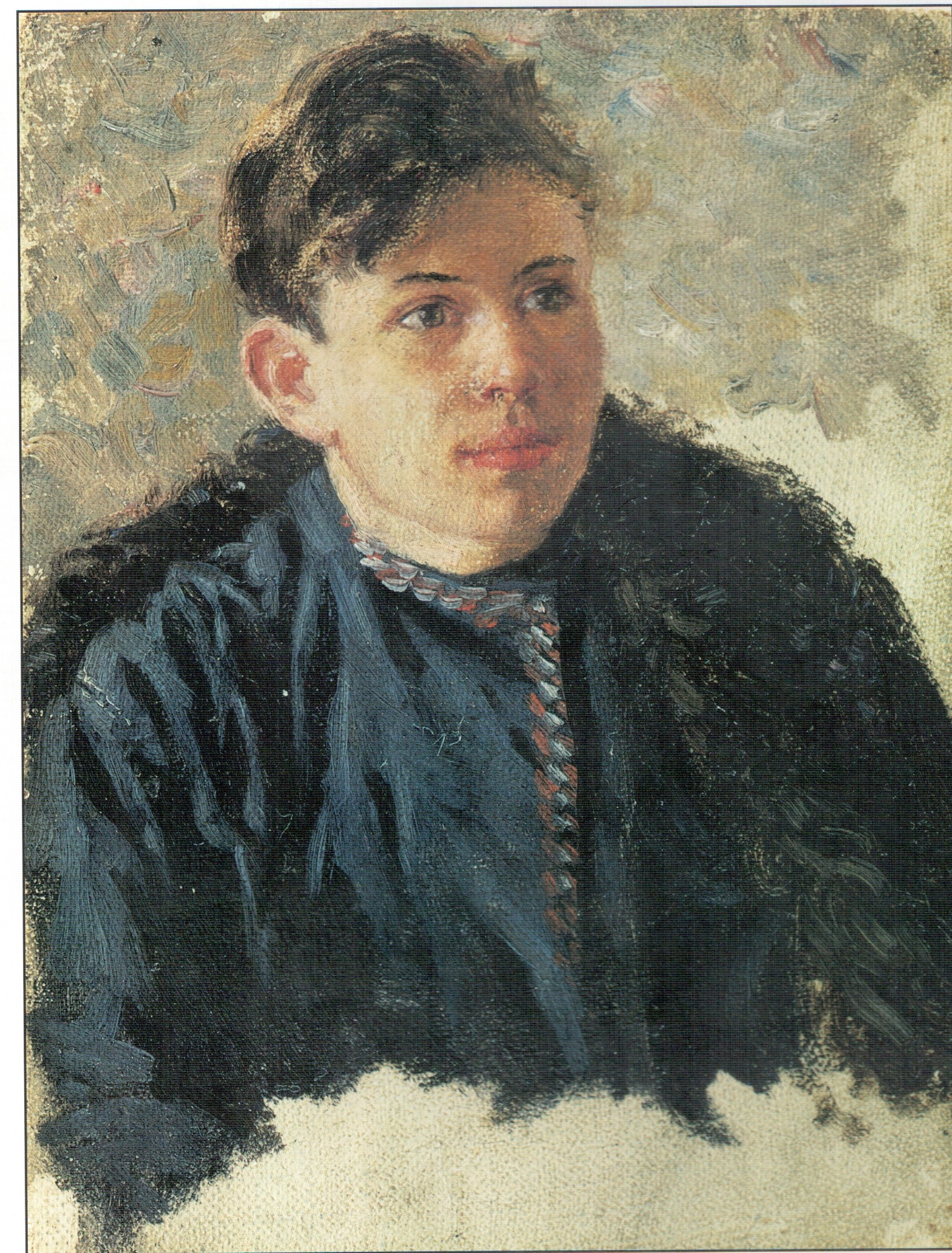 "Портрет юноши Леонида Чернышева". Холст, масло,15х11,5. Красноярский краеведческий музей.